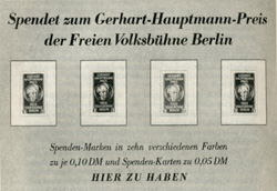 Spendenaufruf zum Gerhart-Hauptmann-Preis own work/scan 28.12.2006/ FVB